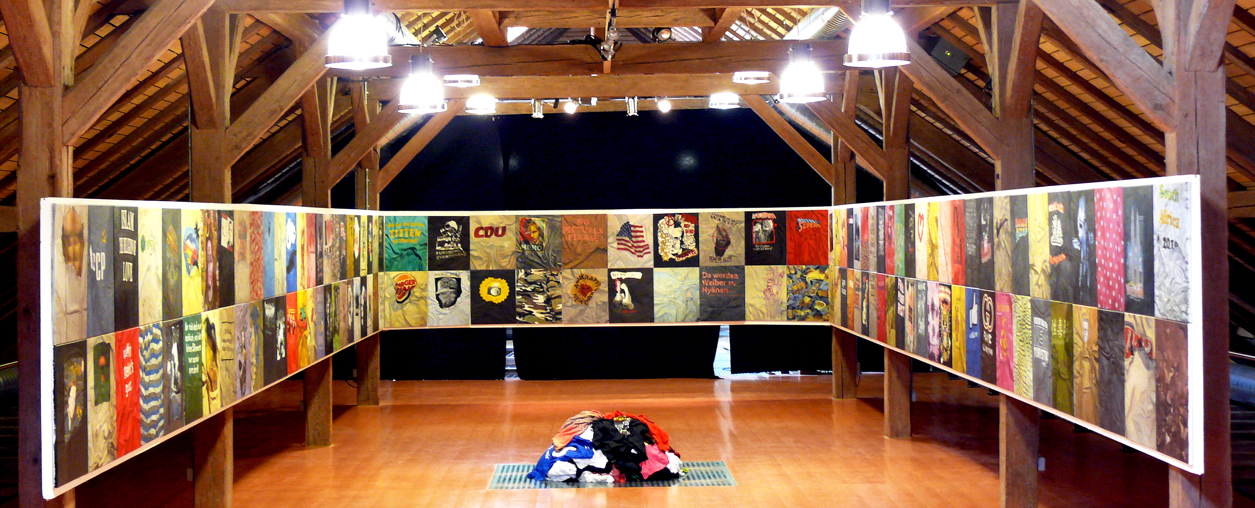 Rauminstallation 200 T-Shirts aus über 15 Ländern 200 Ölgemälde, je 40 x 60 cm, Öl auf Leinwand, 2009 - 2016 BODY ROCK besteht aus über 200 verschiedenen T-Shirts sowie auf diese bezugnehmende Ölgemälde. Die T-Shirts wurde durch Werfen in eine zufällige Position gebracht und gemalt. Die textile Oberflache mit ihrem Faltenwurf, durch welchen Aufdrucke optisch verzerrt werden, wurde realistisch wiedergegeben. Somit wird nicht nur eine Verzerrung des Materials dargestellt, sondern auch eine Dekonstruktion und Umgestaltung der Botschaften. In der Rauminstallation sind die Wände des Ausstellungsraumes von den entsprechenden Malereien bedeckt, wahrend in der Raummitte die Oberteile als lose Anhäufung präsentiert werden.